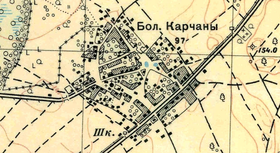 Топографическая карта Ленинградской области, квадрат О-35-23-А-в (Бол. Карчаны), деревня Большие Корчаны